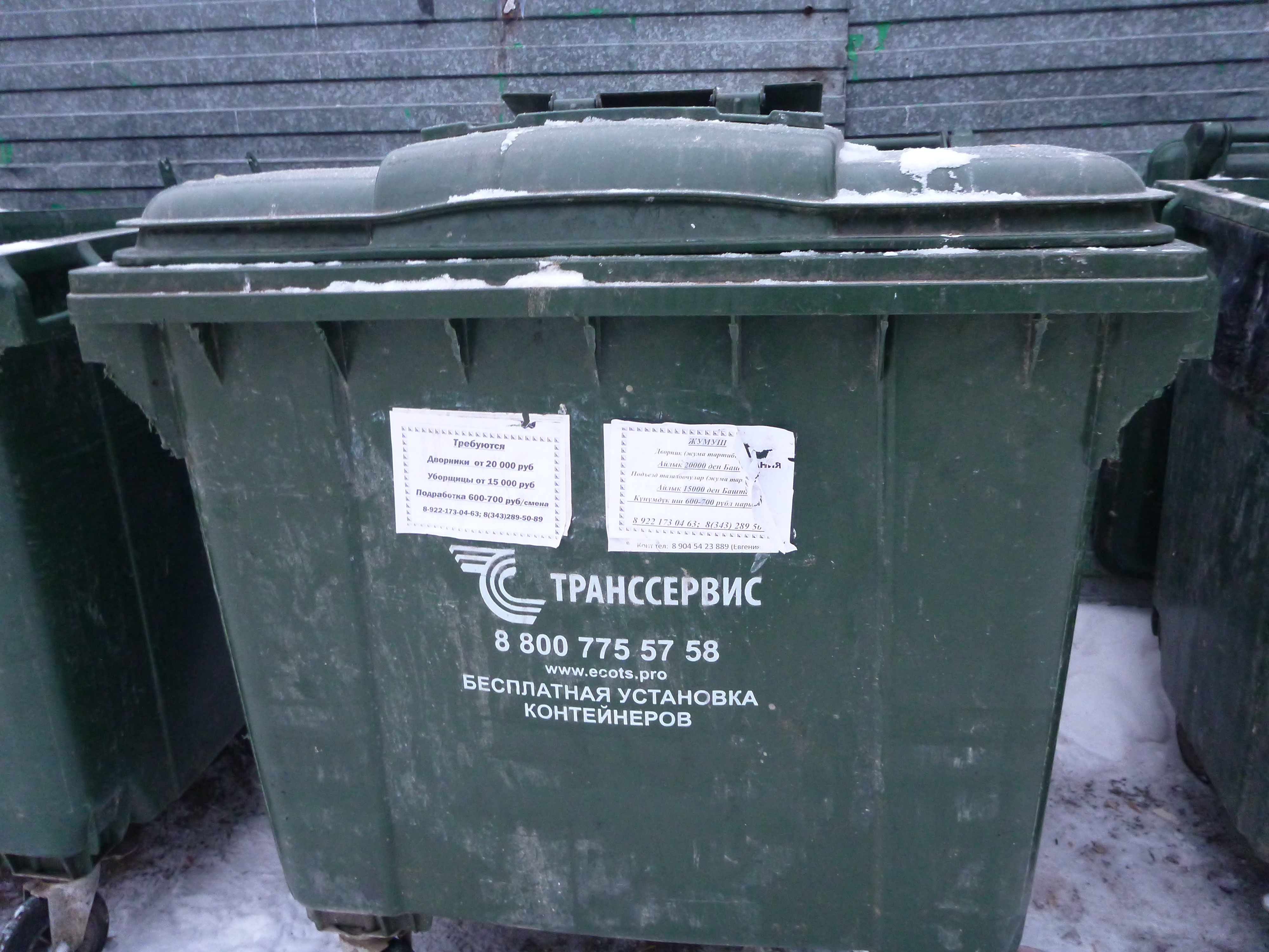 Двуязычное объявление о поиске работы в Екатеринбурге 2020 год